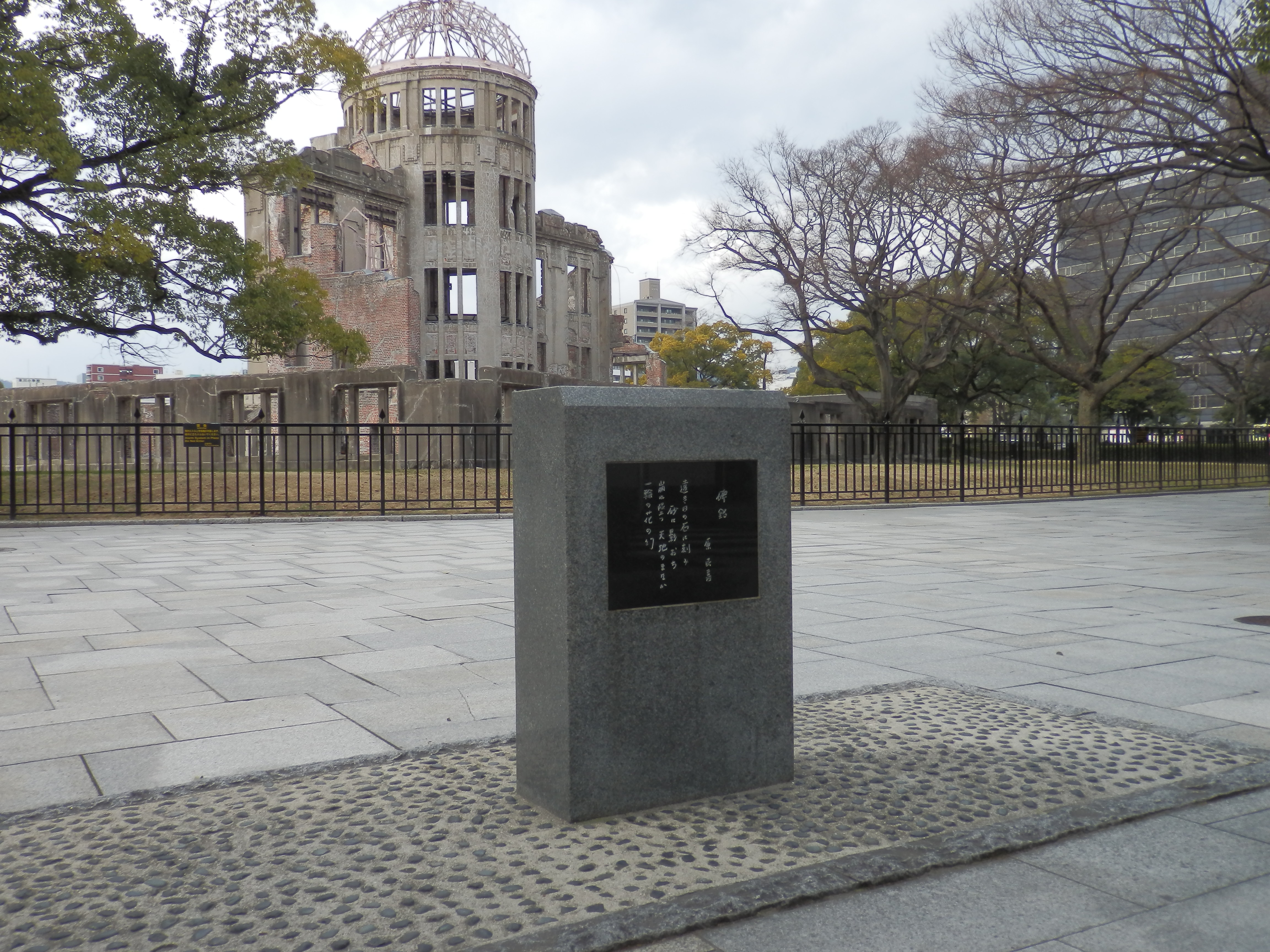 原民喜詩碑。広島平和記念公園内。